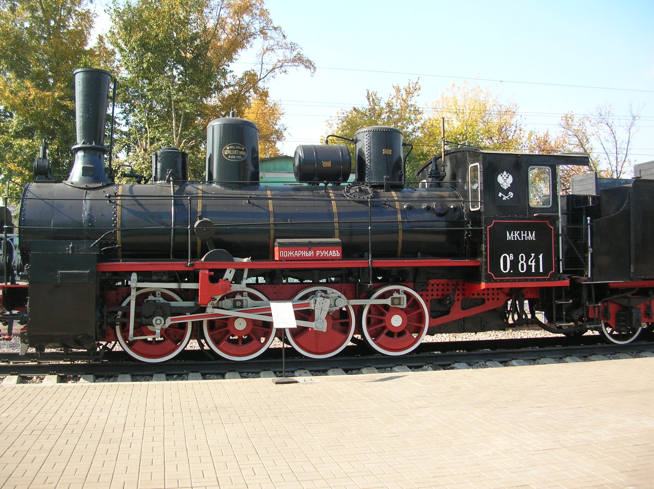 Russian steam locomotive Ov841. Manufactured in 1903. Moscow railroad museum